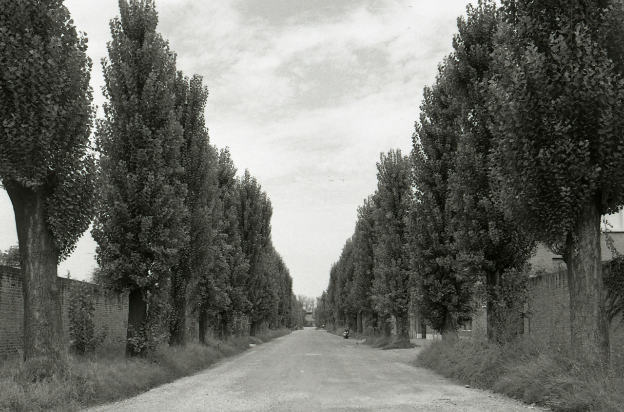 Servizio fotografico : Ferrara, 1974 / Paolo Monti. - Strisce: 7, Fotogrammi complessivi: 36 : Negativo b/n, gelatina bromuro d'argento/ pellicola ; 35 mm. - ((Sul portanegativi: N[I]K[MA]T FP4. - Occasione: Documentazione del centro storico. - Fonte: Agenda di Paolo Monti: Leica 1501-3000 Controllo numerazione (1950-1978), presso Archivio Paolo Monti. - Fonte: Fattura di Paolo Monti: IV. Commesse/ Fattura n. 18/ Riprese fotografiche del centro storico (Mostra Vitalità del centro storico) (1974/10/16), presso Archivio Paolo Monti